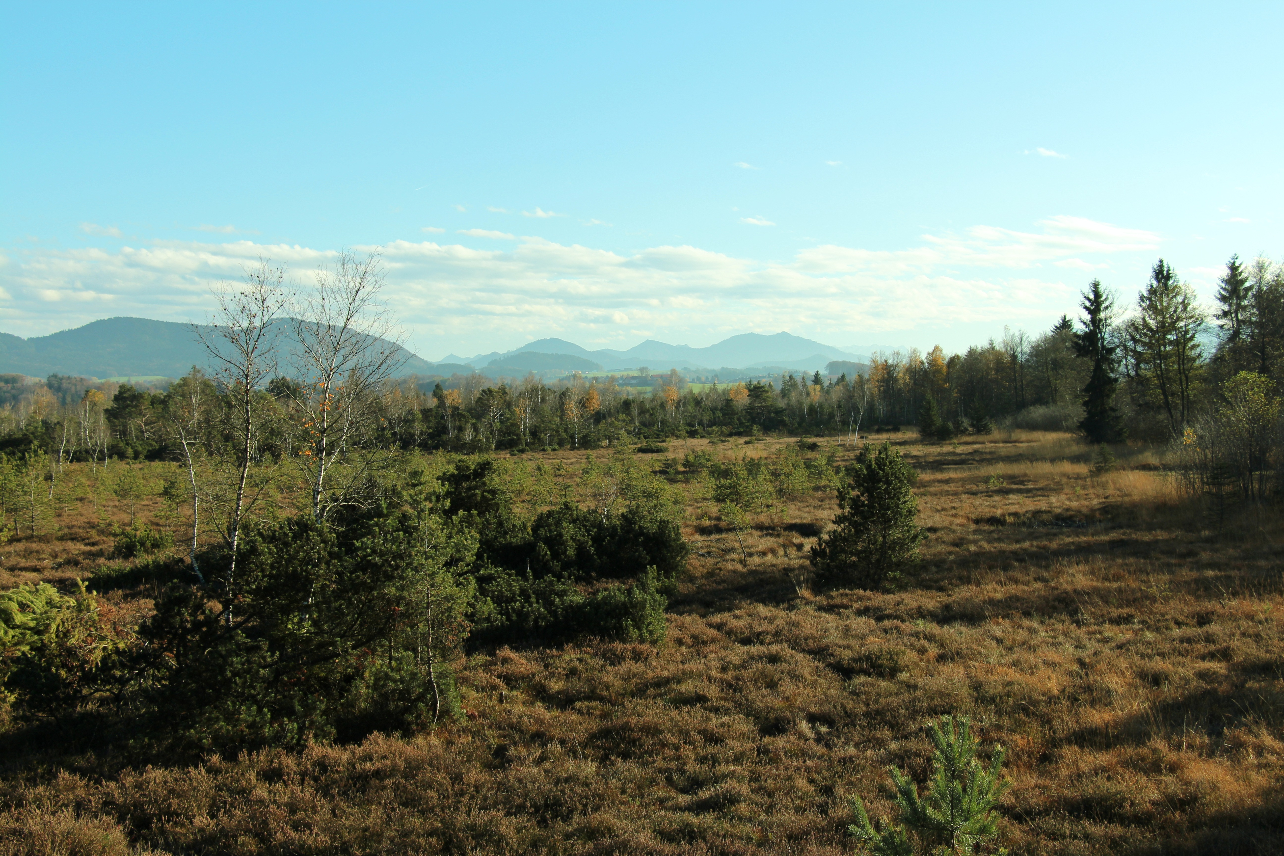 Im Europaschutzgebiet Wenger Moor, Gemeinde Köstendorf, Land Salzburg